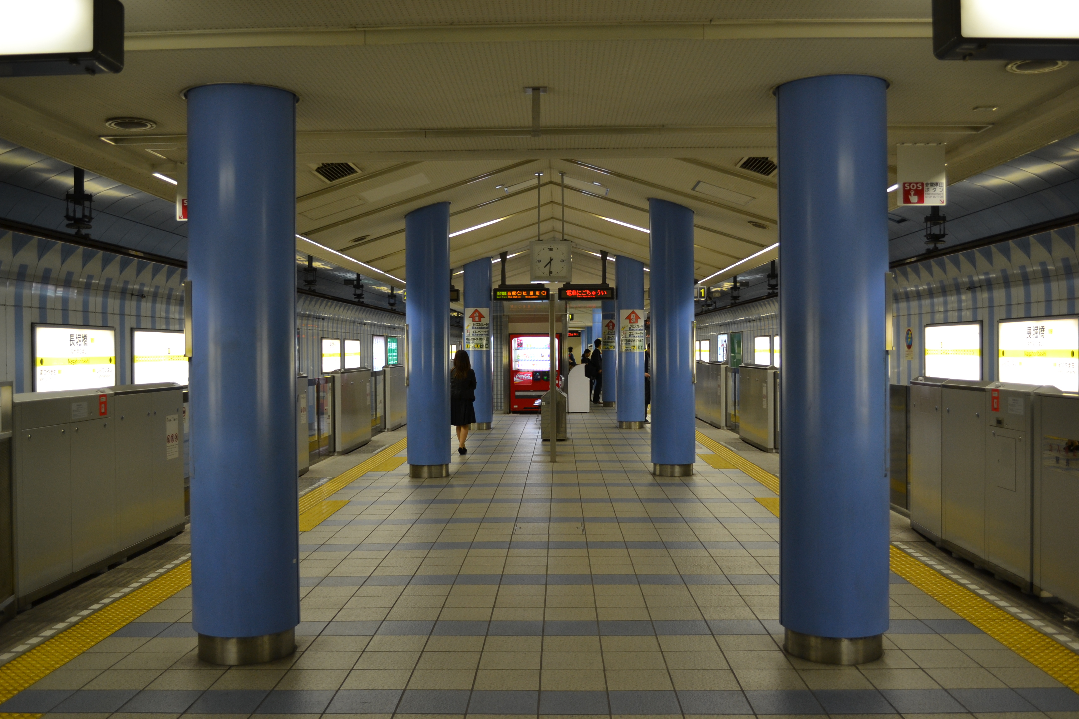 長堀橋駅長堀鶴見緑地線プラットホーム